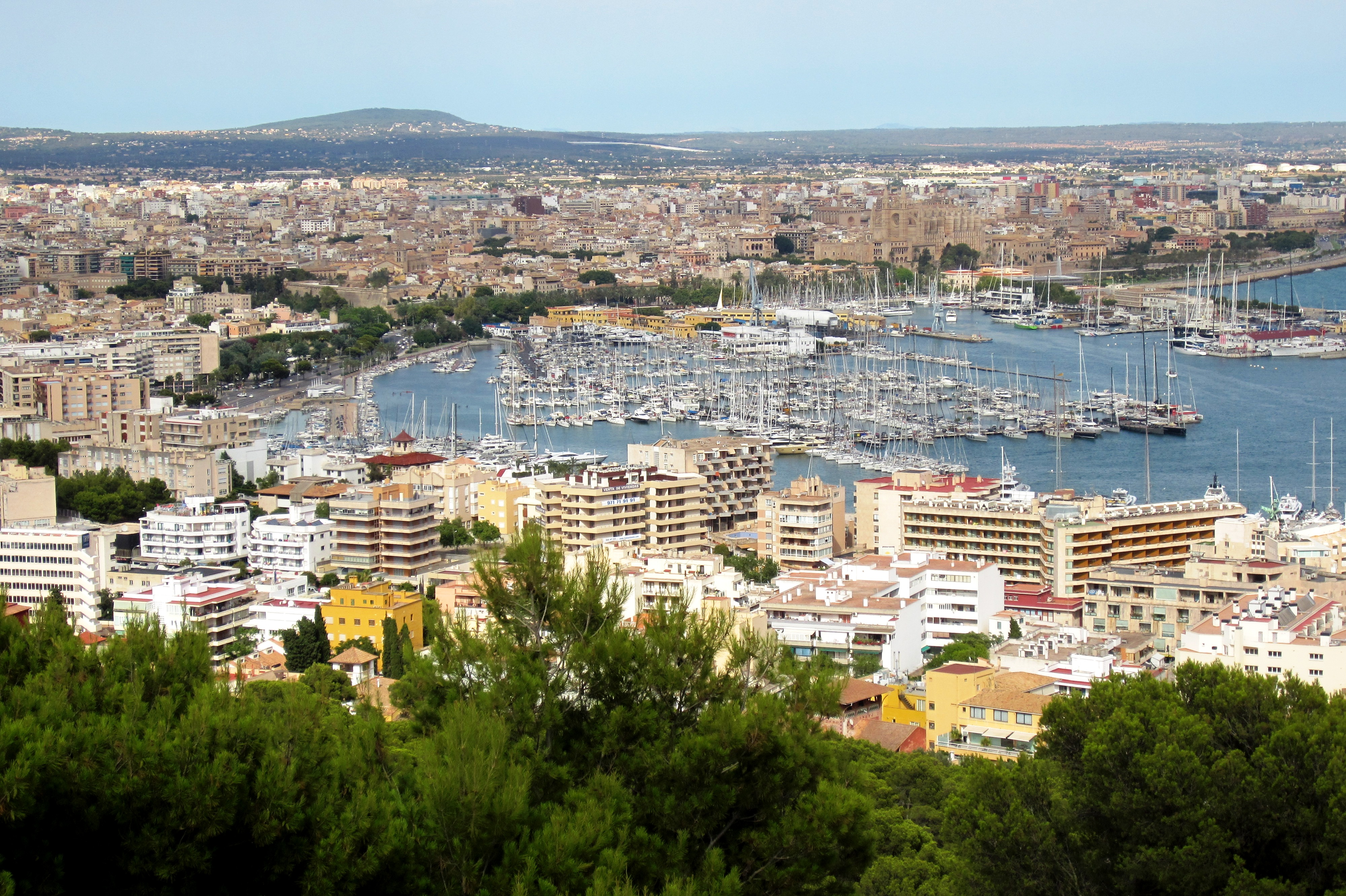 Blick vom Castell Bellver auf den Yachthafen von Palma de Mallorca